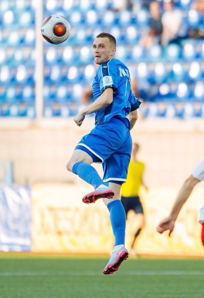 Футболист Житнев Максим Игоревич